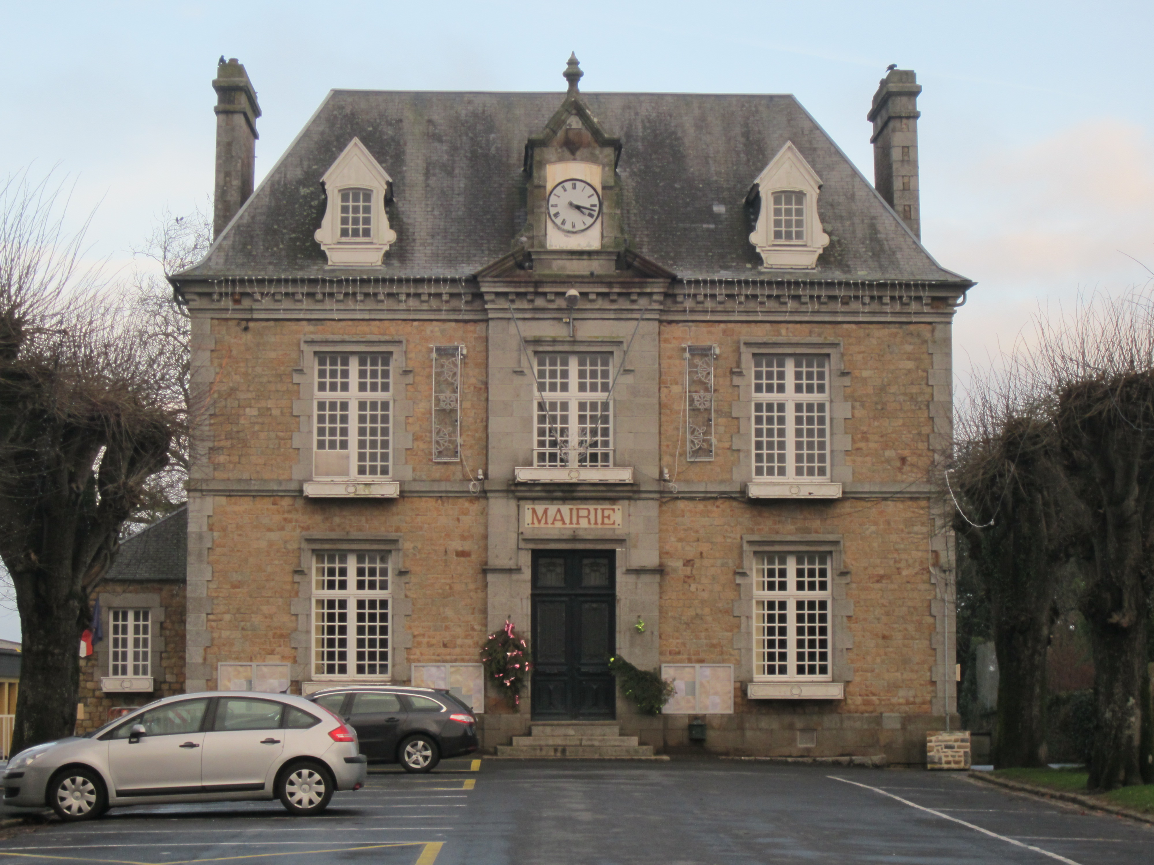 Sartilly